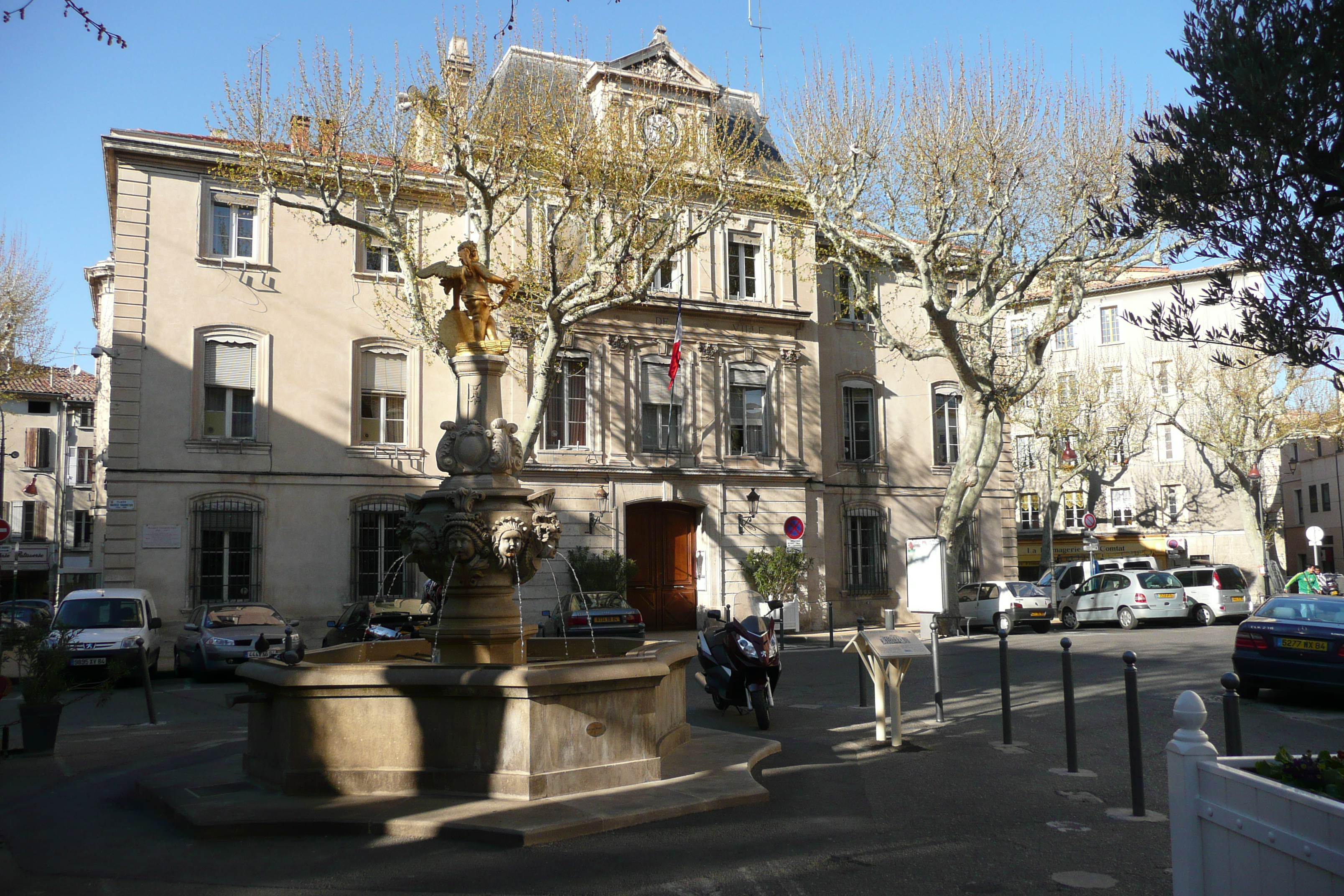 Fontaine à Carpentras